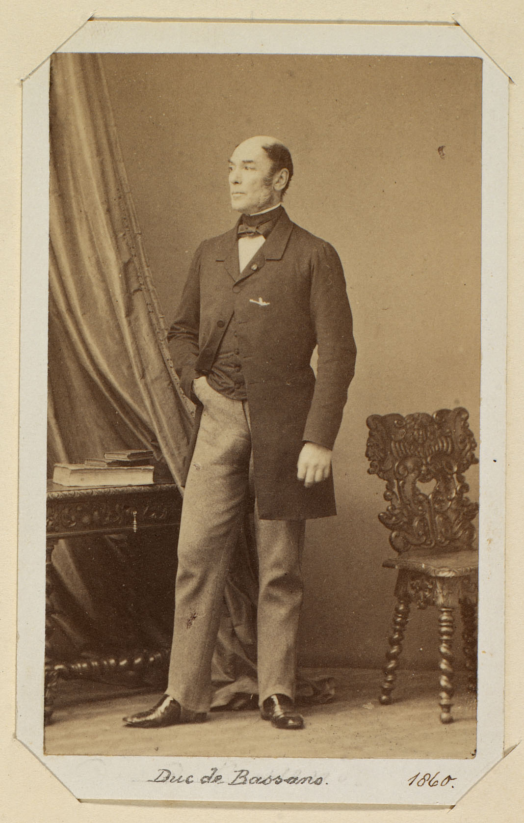 Portrait de Napoléon Joseph Hugues Maret (1803-1898), duc de Bassano, sénateur du Second Empire.